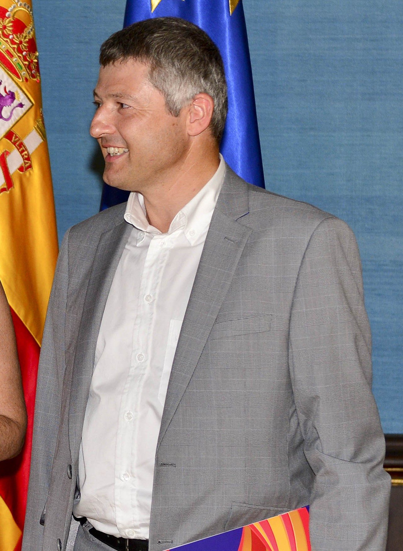 Josep Ramon Bosch (izquierda, Susana Díaz (centro) y Joaquim Coll (derecha)